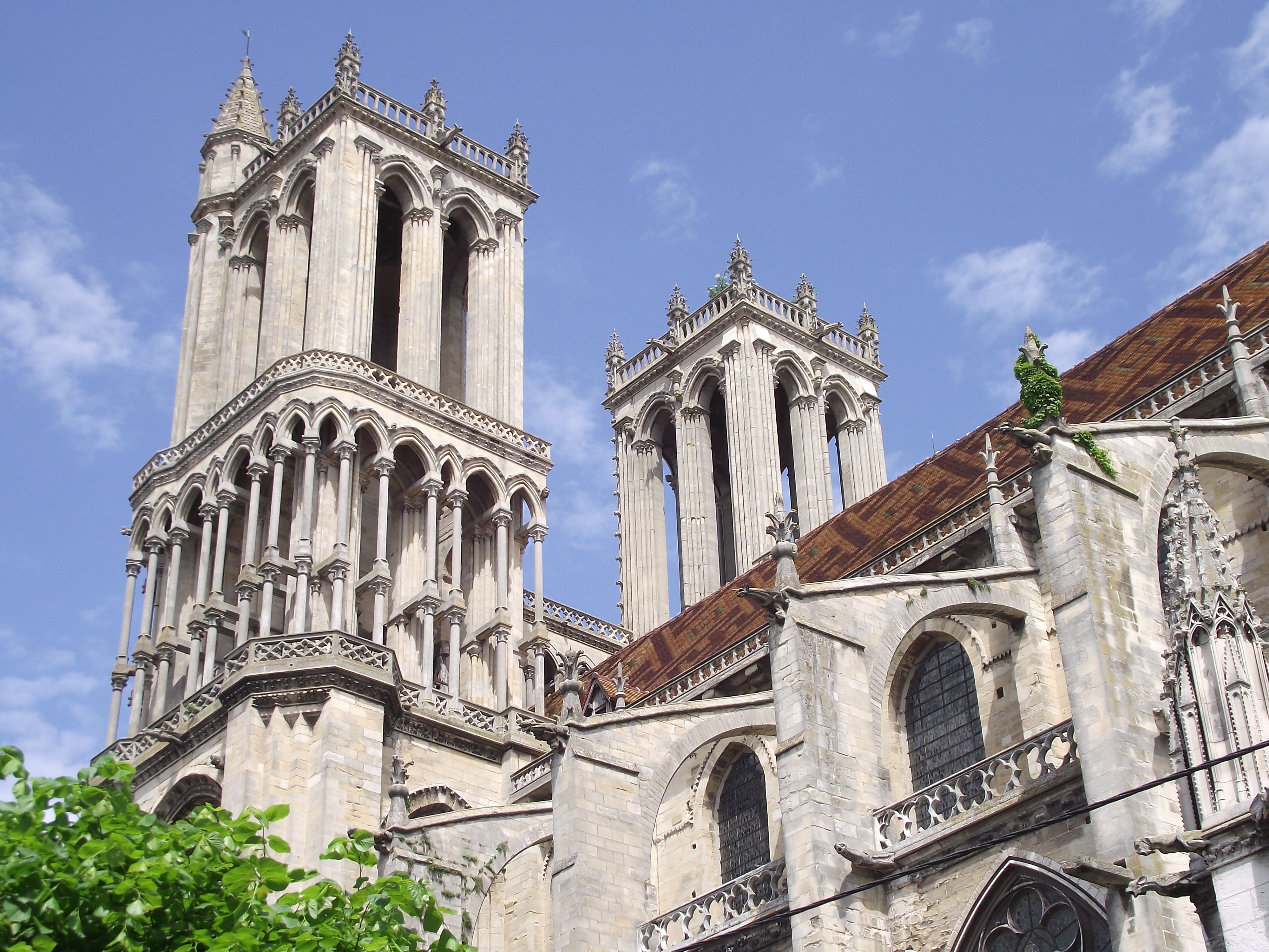 Mantes-la-Jolie, Collégiale Notre-Dame, 1150-1350